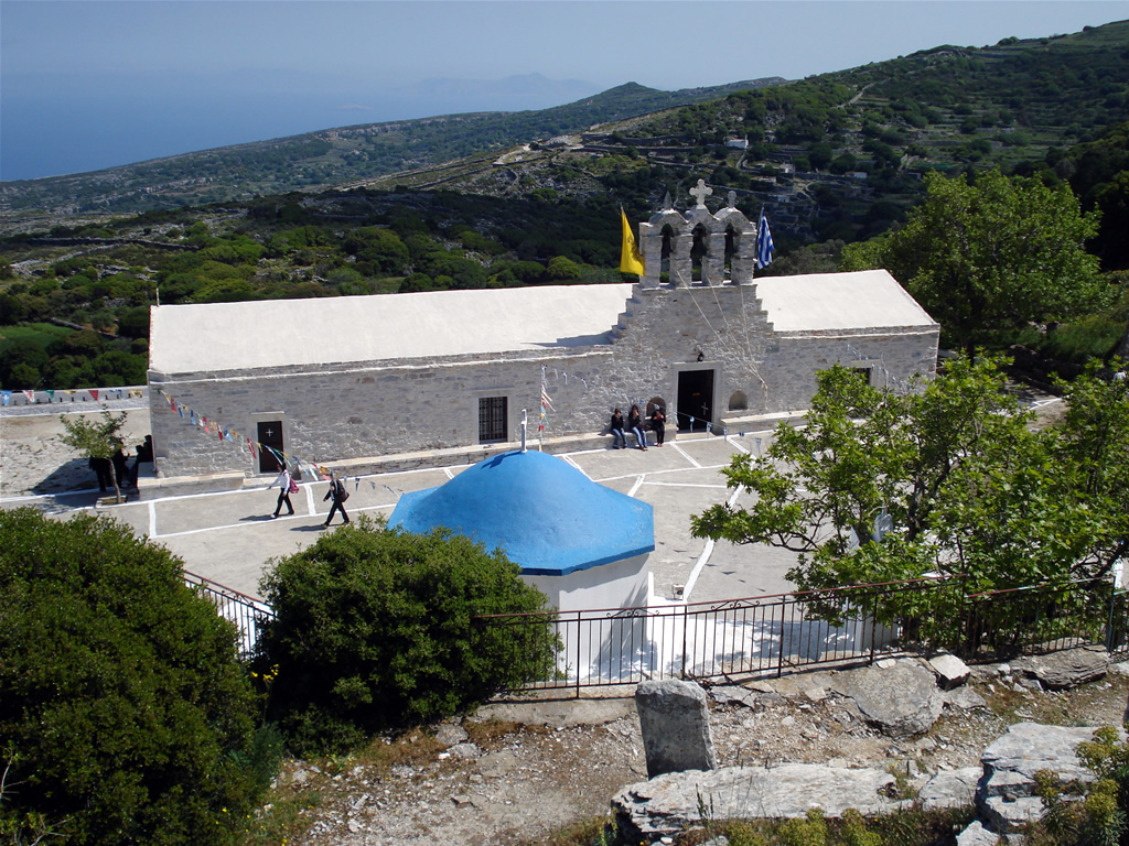 Ο παλαιός ναός